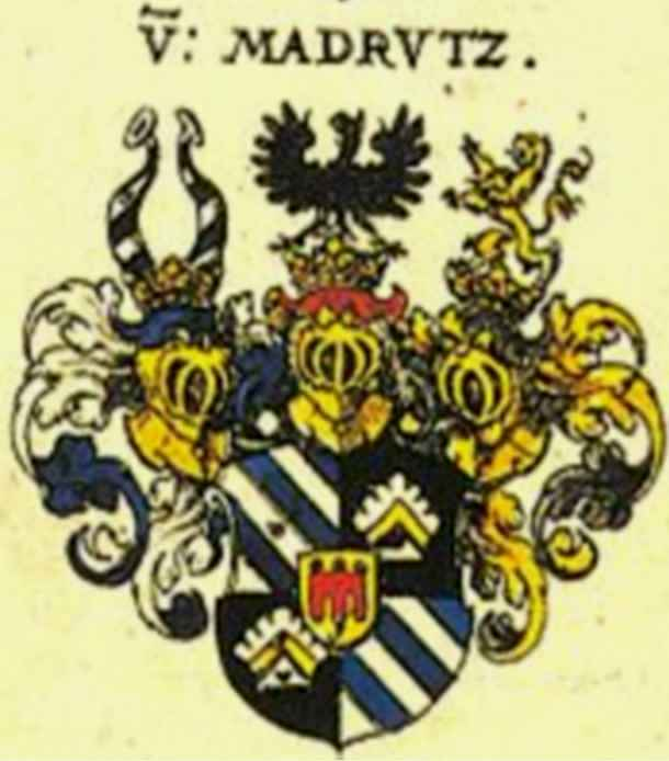 Wappen der Familie Madrutz nach Siebmachers Wappenbuch